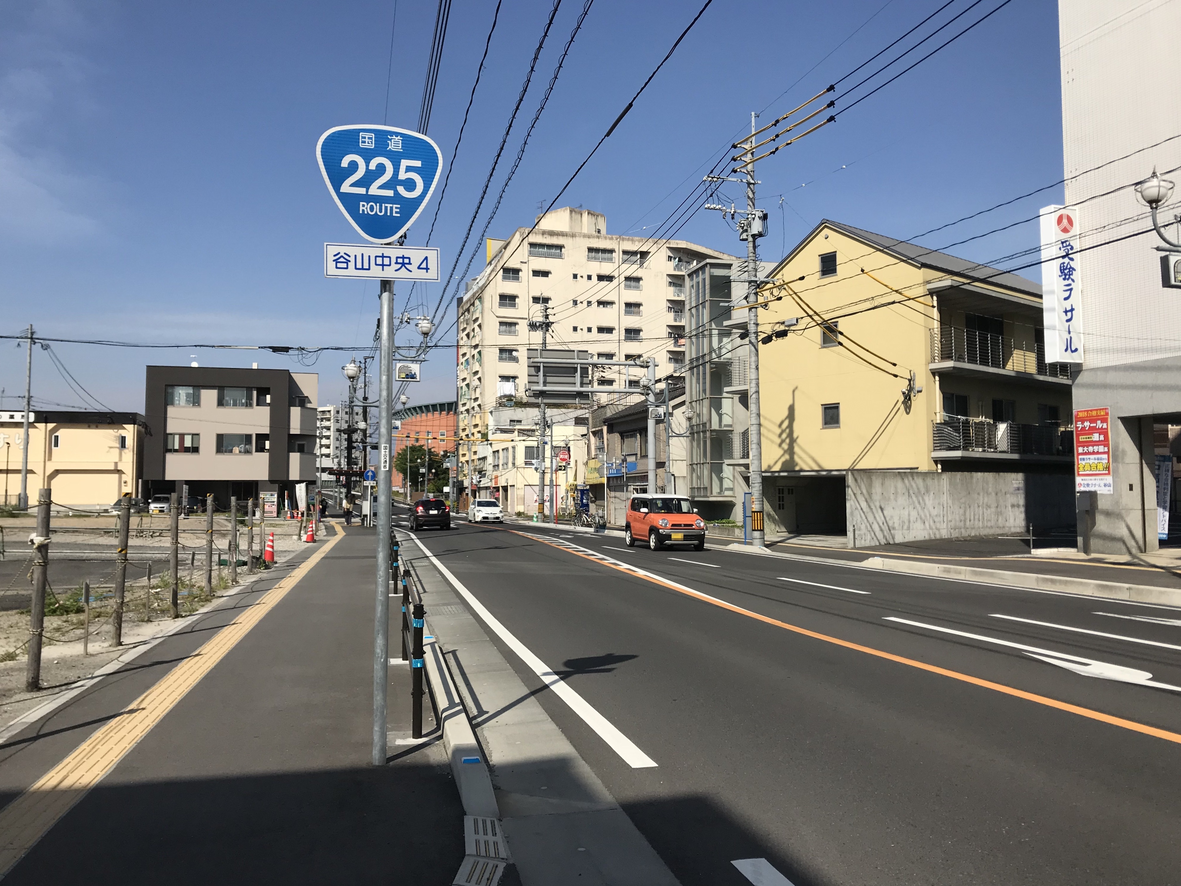 JR谷山駅付近の国道225号